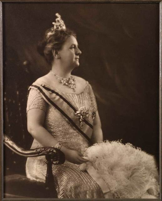 Staatsieportret van Koningin Wilhelmina, 1931 Dat een staatsieportret de vorstin niet ten voeten uit en en face hoeft weer te geven, bewijst Ziegler met dit koninklijke portret van Wilhelmina. De kop uit dit portret verwerkte Piet Zwart in moderne ontwerpen voor postzegels van 36, 70 en 80 cent, die in 1931 en 1933 werden uitgegeven. Het was de eerste keer dat fotografie werd toegepast in een postzegel.